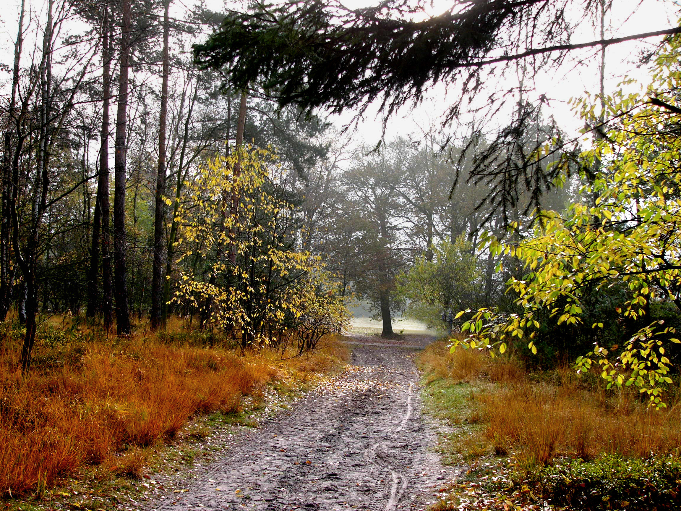 Sennelandschaft im Herbst, Deutschland